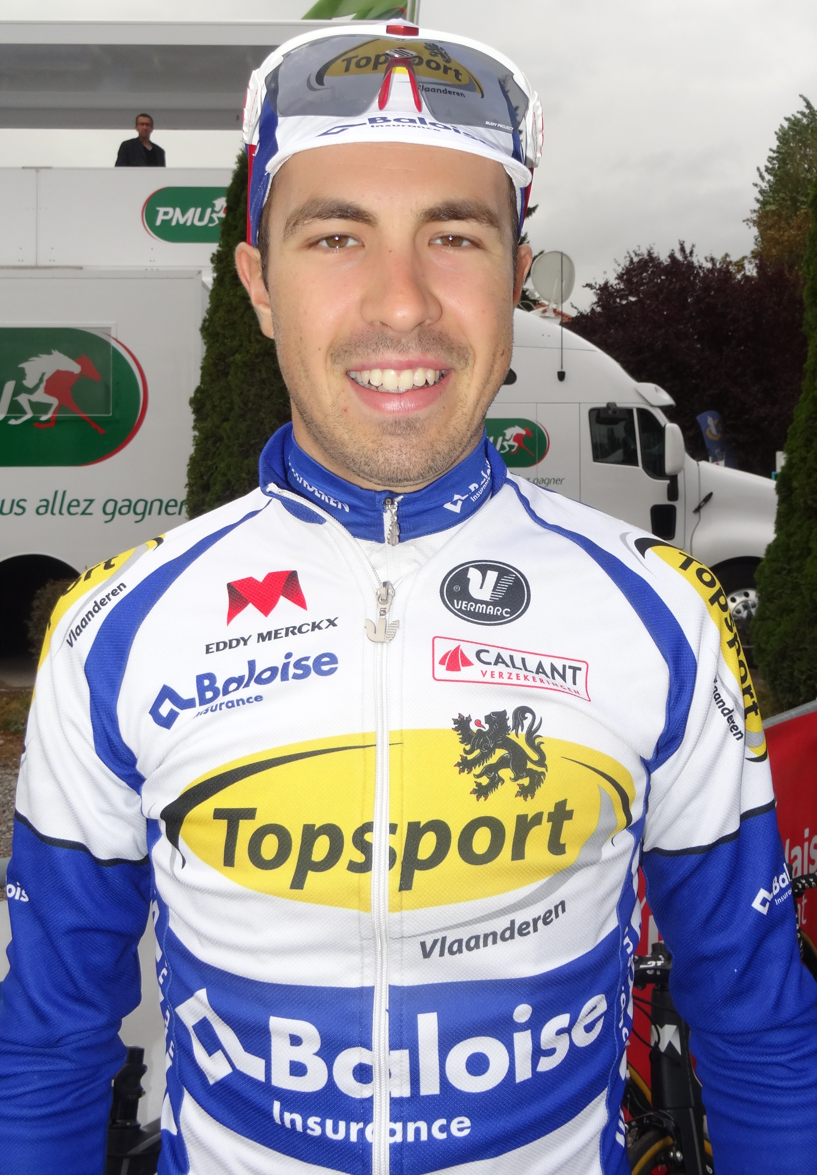 Reportage réalisé le dimanche 21 septembre à l'occasion du départ et de l'arrivée du Grand Prix d'Isbergues 2014 à Isbergues, Nord-Pas-de-Calais, France.